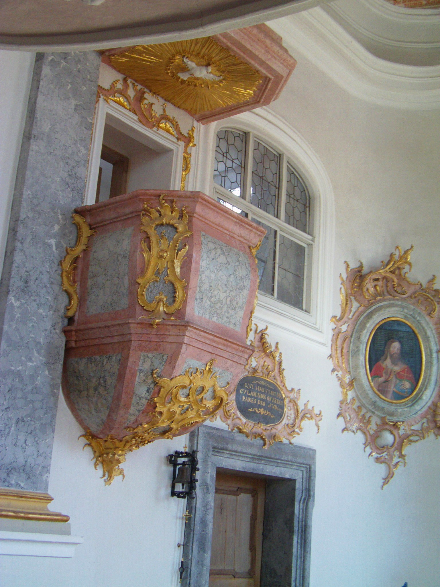 Kelheim Kloster Weltenburg. Frauenbergkapelle innen 2011